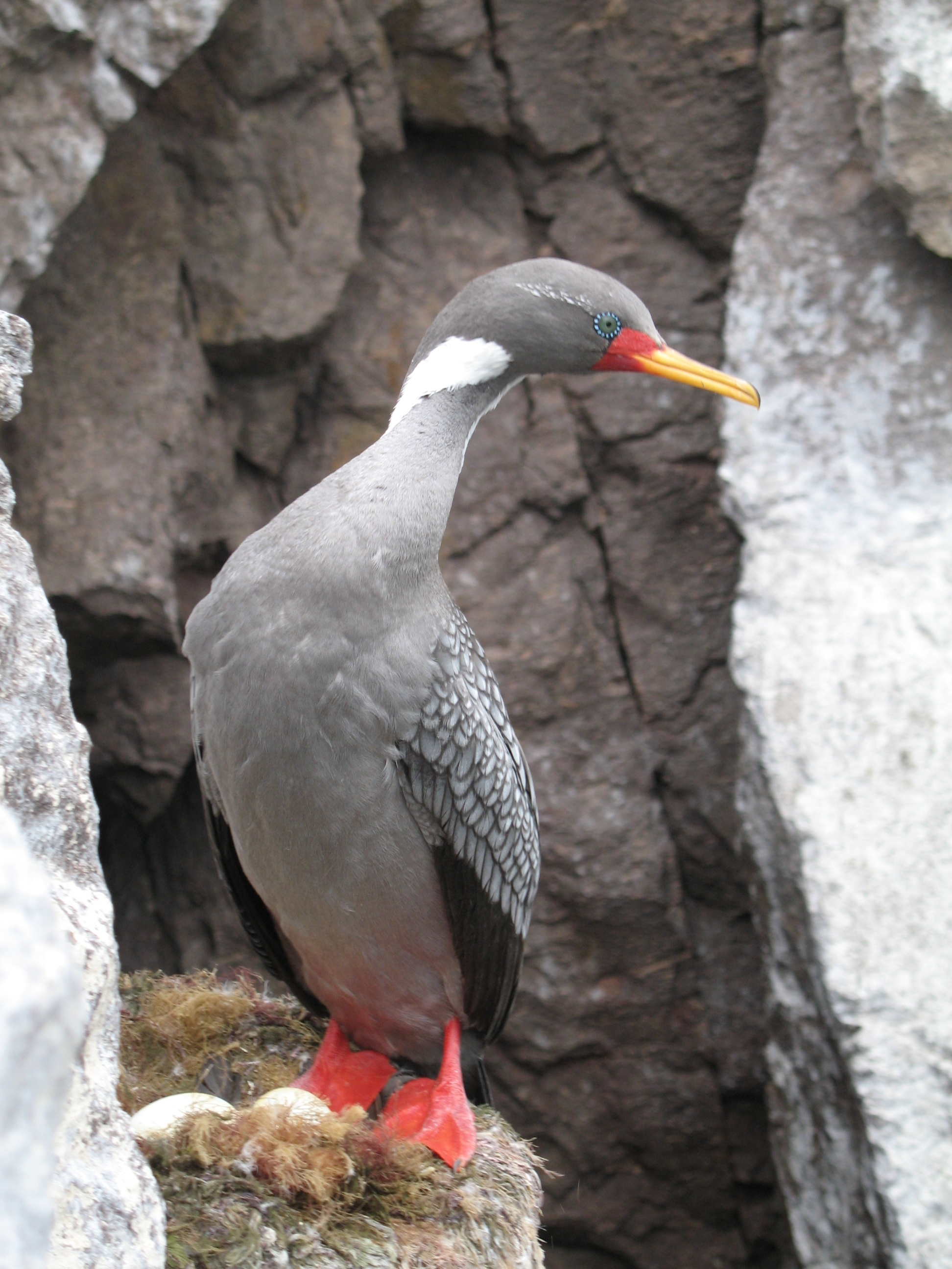 Cormorán gris (Phalacrocorax gaimardi al norte de Bahía del Oso Marino, cerca de Puerto Deseado, Santa Cruz (Argentina).